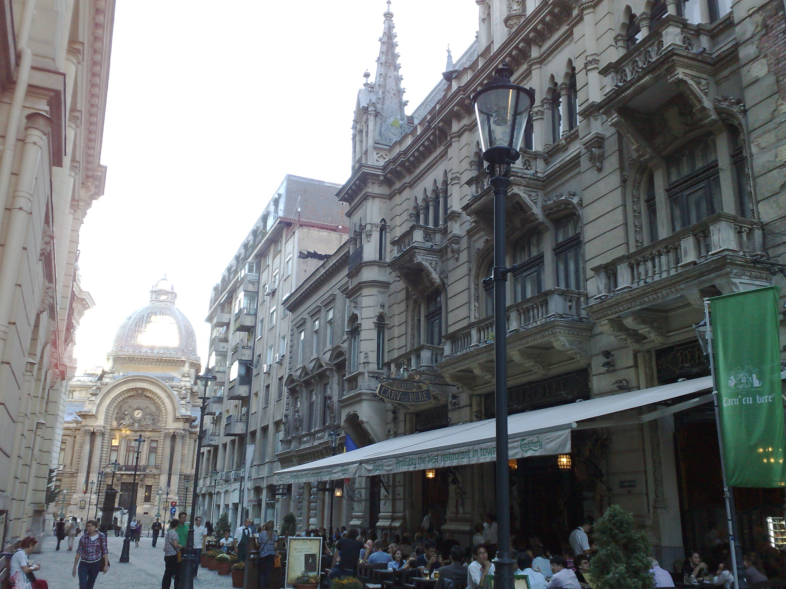 Clădirea „Carul cu bere""